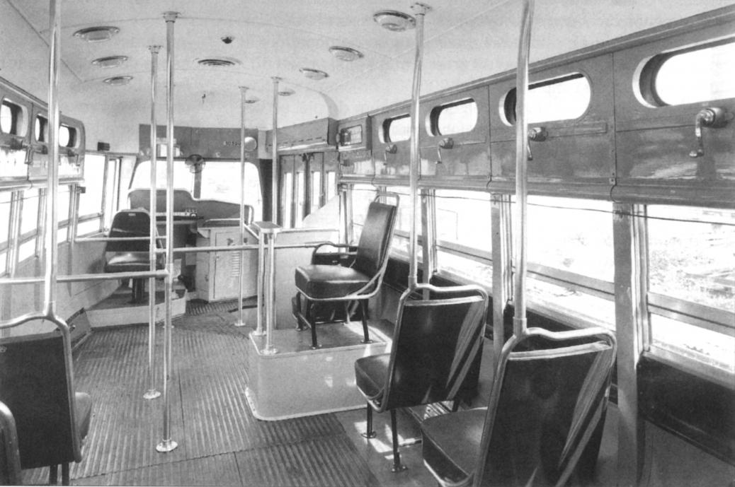 Vue avant de l'intérieur d'une motrice PCC de la SNCV.